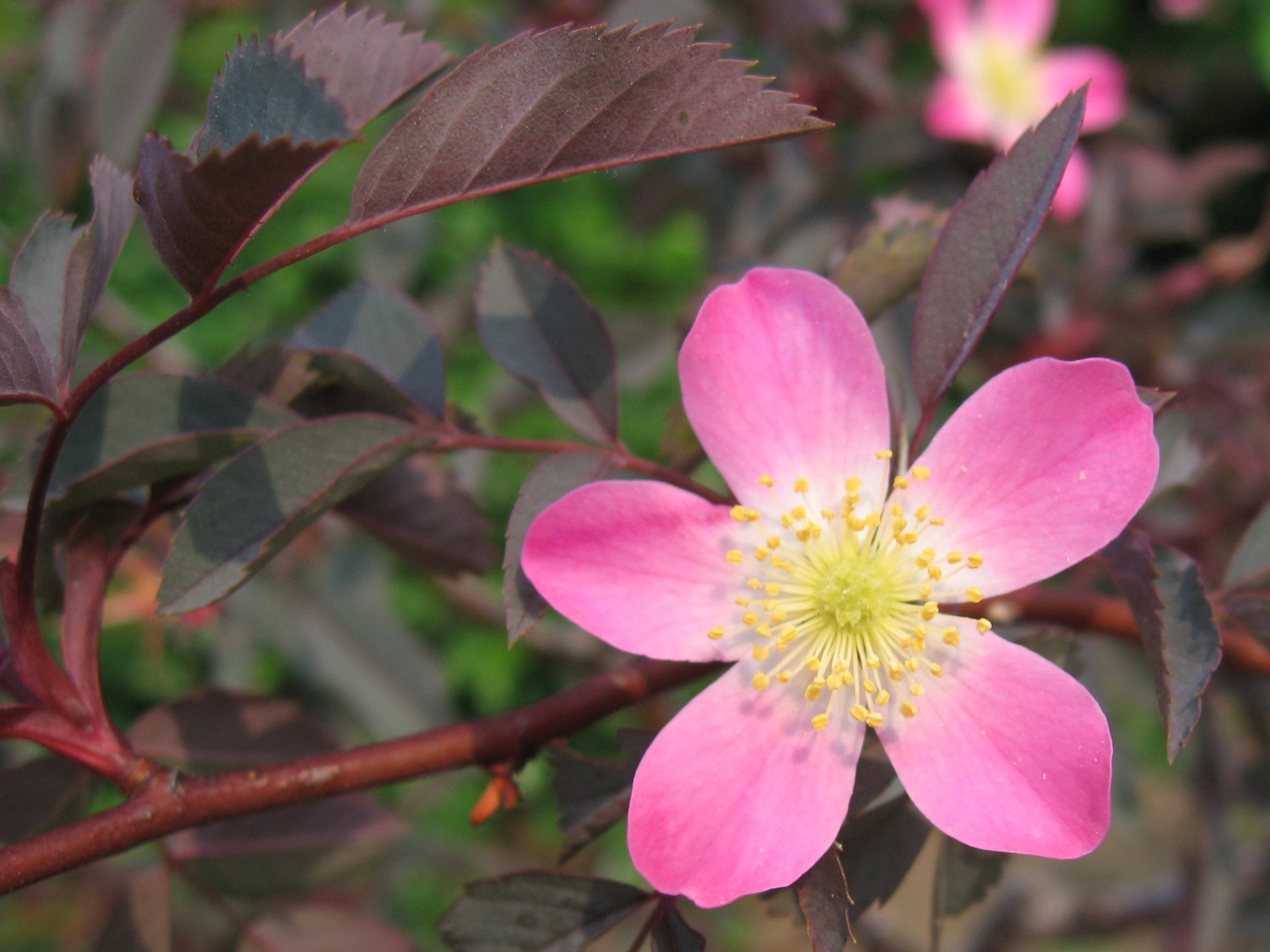 Rosa glauca, Location:Matsusaka Bell-Farm, Isedera Matsusaka Mie, Japan